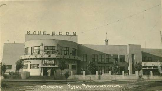 Здание Клуба Машиностроения, Таганрог, 1928 г.